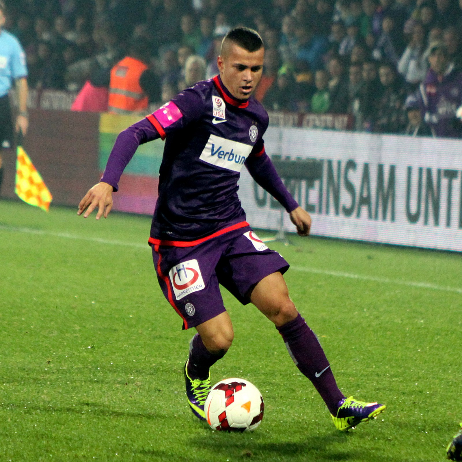 Meisterschaftsspiel der österreichischen Bundesliga: FK Austria Wien gegen FC Red Bull Salzburg (0:0) am 6. Oktober 2013 in Wiener Generali Arena. - Das Foto zeigt Srdan Spiridonovic (FK Austria Wien).